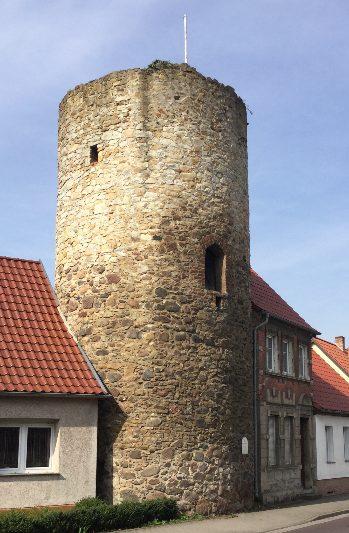 Grätzer Straße 22 (Möckern) Turm